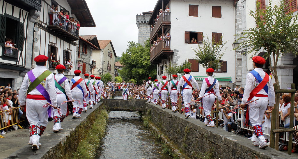 Lesakako Zubigaineko dantza, 2019